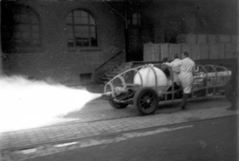 Ein interessantes neuartiges Raketen-Fahrzeug! Der erste Startversuch mit dem grössten Flüssigkeits-Raketenmotor der Welt in Berlin-Britz. Es wurde eine Anfangs-Stundengeschwindigkeit von 185 km.- erzielt Information added by Wikimedia users.